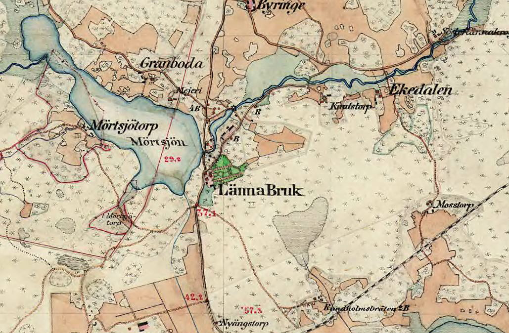 Länna bruk med omgivning